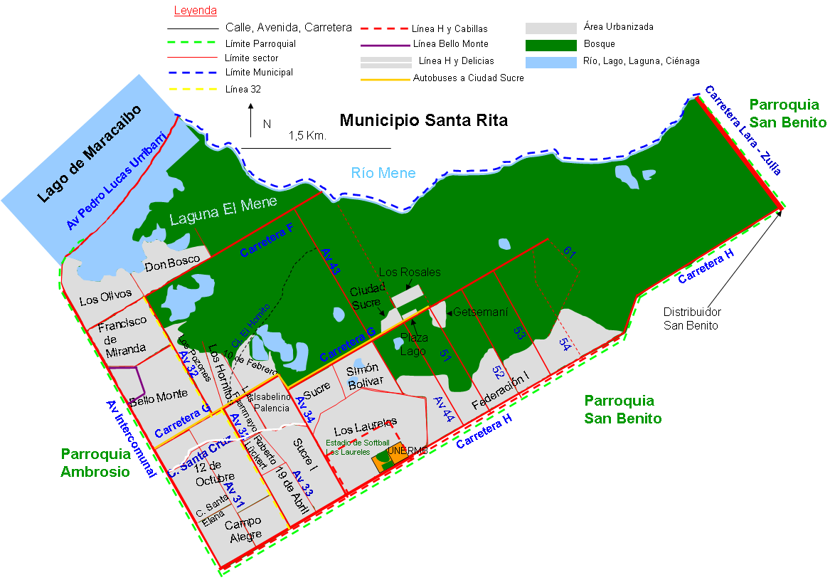 Mapa de la Parroquia Germán Ríos Linares, Municipio Cabimas, Zulia, Venezuela